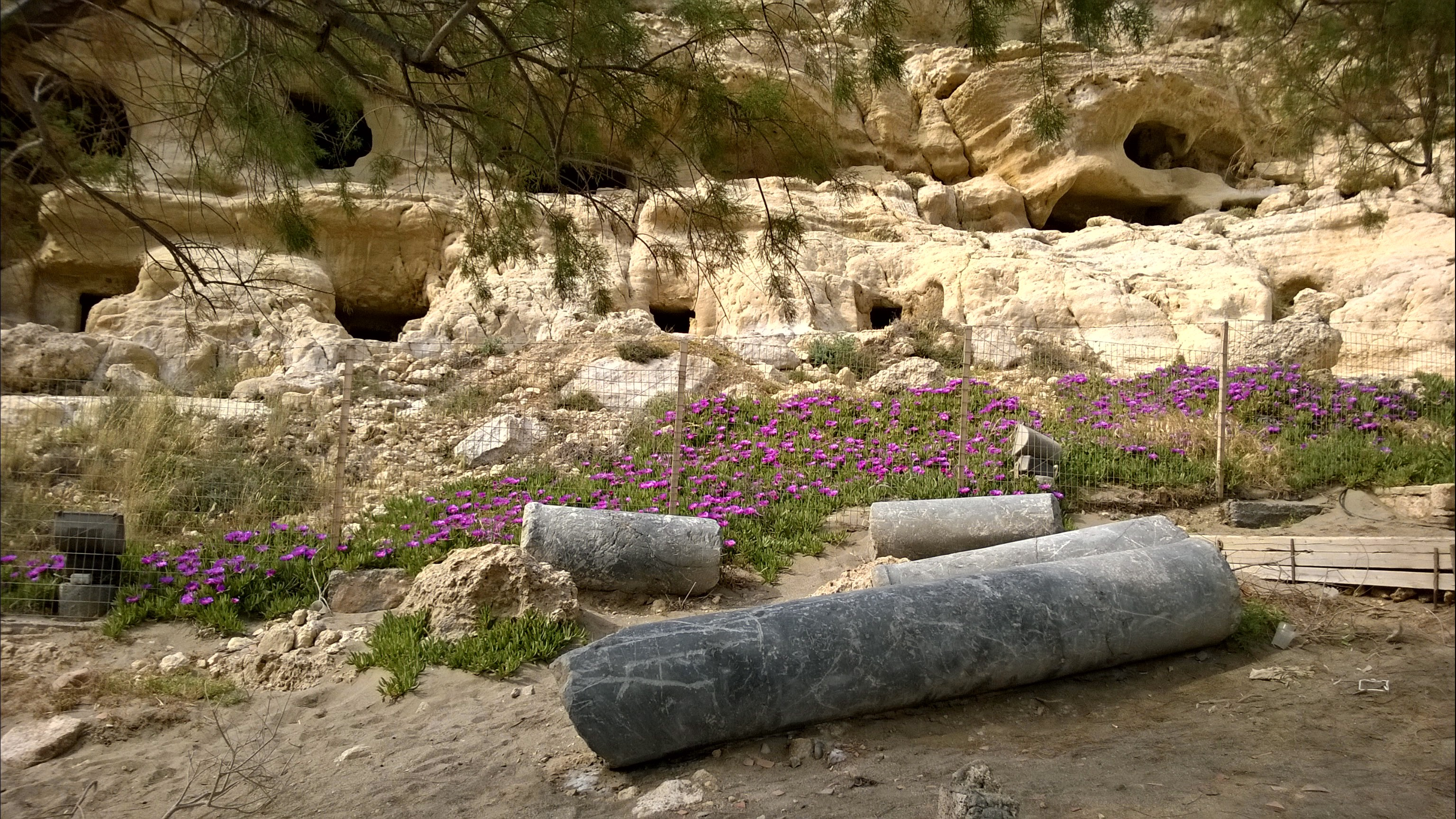 Matala